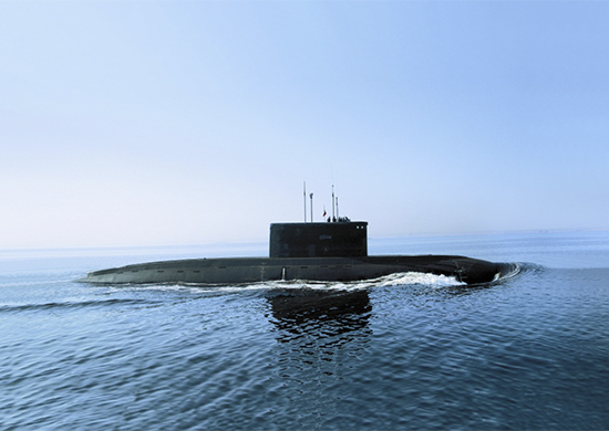 Новороссийская военно-морская база